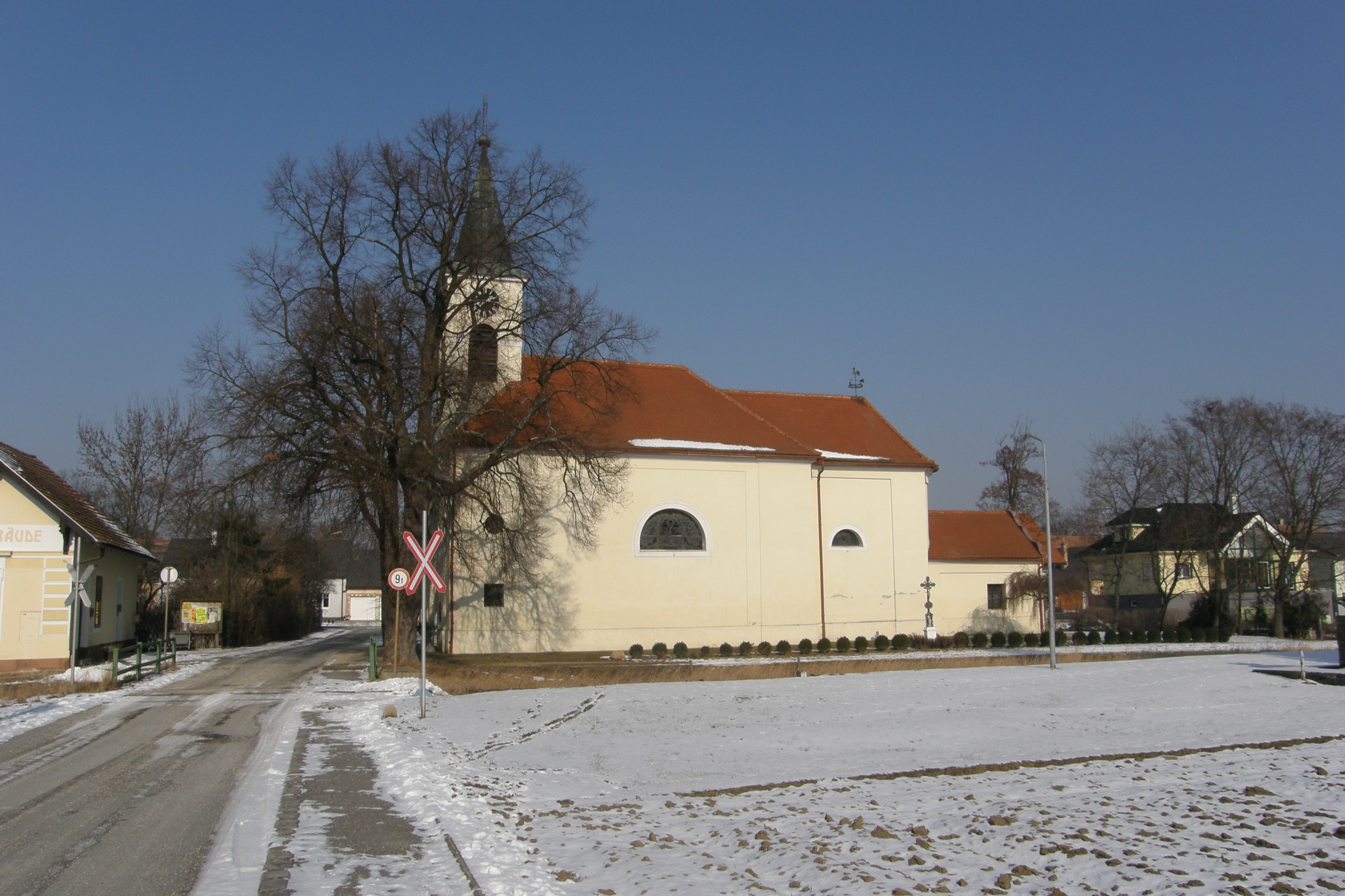 Kath. Filialkirche hl. Johannes Nepomuk